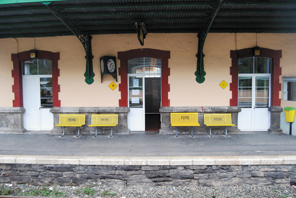 Karrantza geltokia Feve